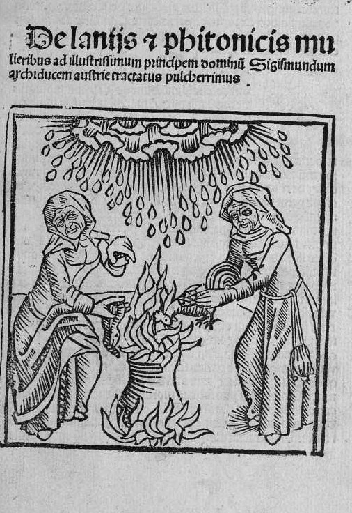 Holzschnitt 6: "Hexenküche, Hexensud": Zwei Hexen kochen einen Sud zur Erzeugung von Hagelunwetter.